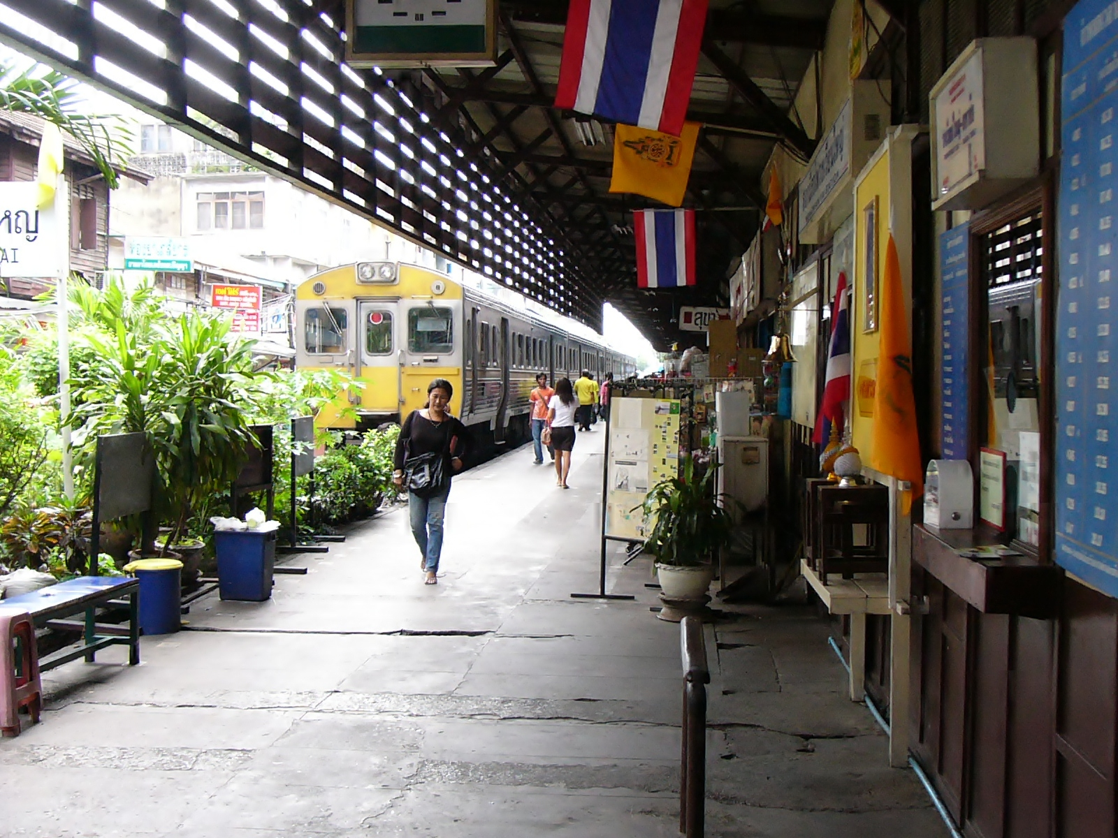 ホームと手車中の列車。手前が出札口。